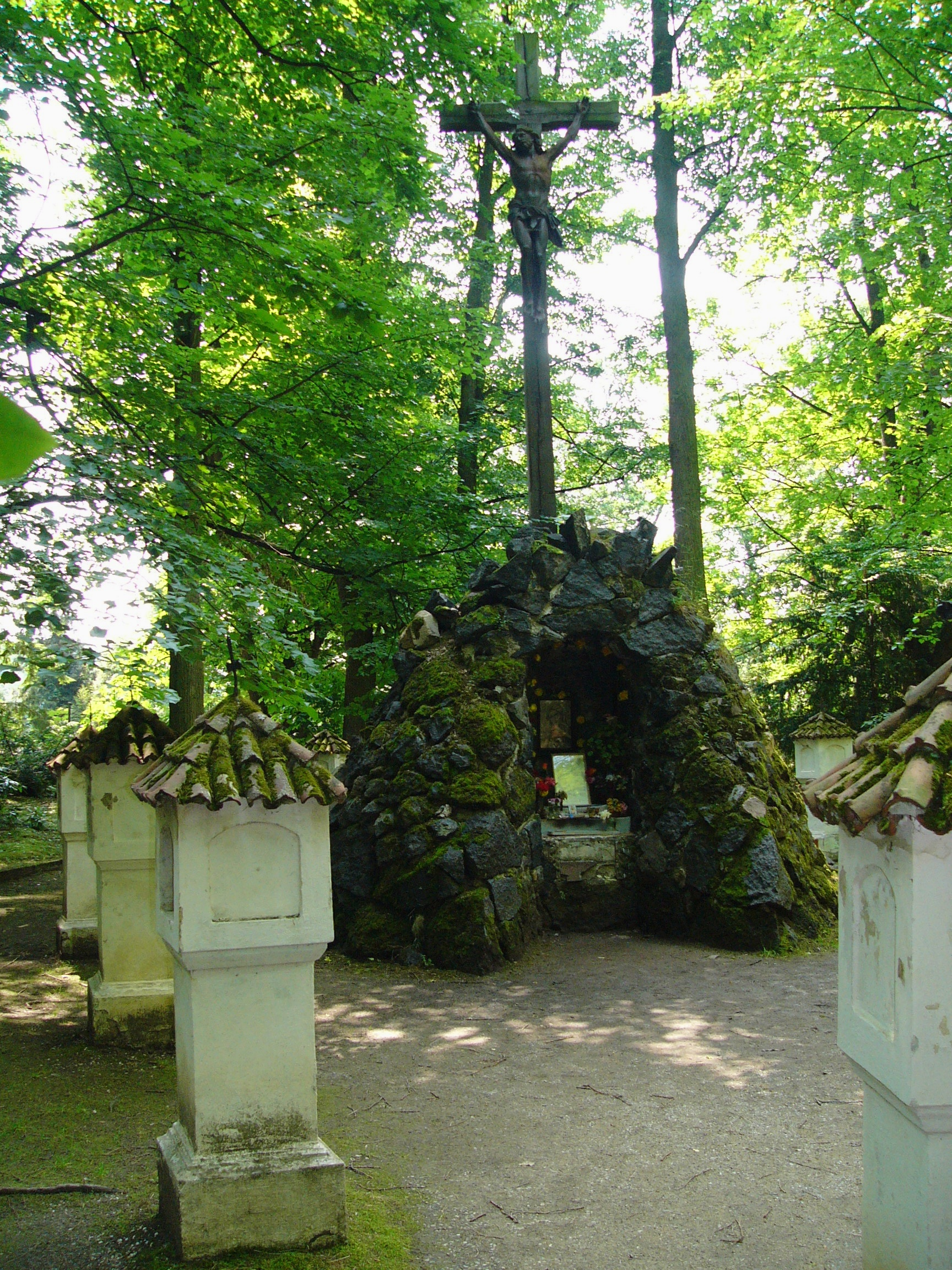 Konopiště, křížová cesta v zámeckém parku s Lurdskou jeskyní s křížem